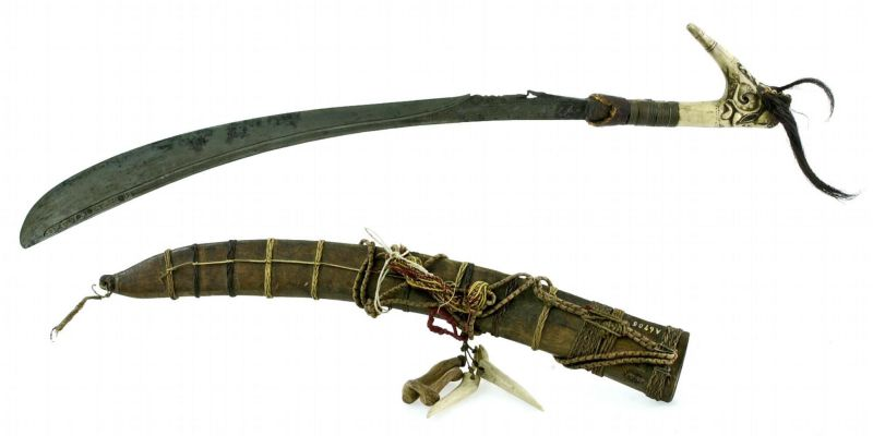 Zwaard. De mandau werd vroeger als koppensnellerszwaard gebruikt, maar ook als werktuig voor dagelijkse klusjes. Het bijbehorende kleine mesje werd gebruikt voor snijwerk, maar ook voor het uitbenen van de gesnelde kop.. Zwaard met schede